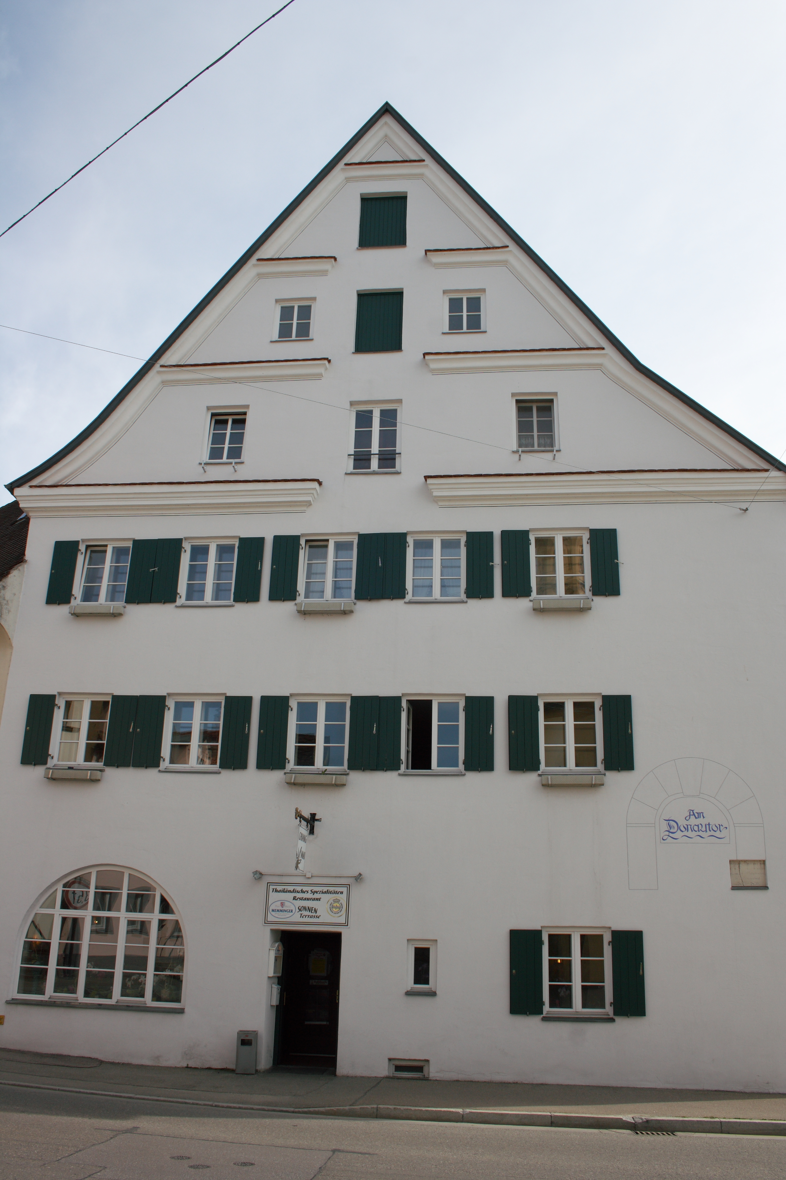 Donaustraße 25 in Lauingen im Landkreis Dillingen an der Donau (Bayern)